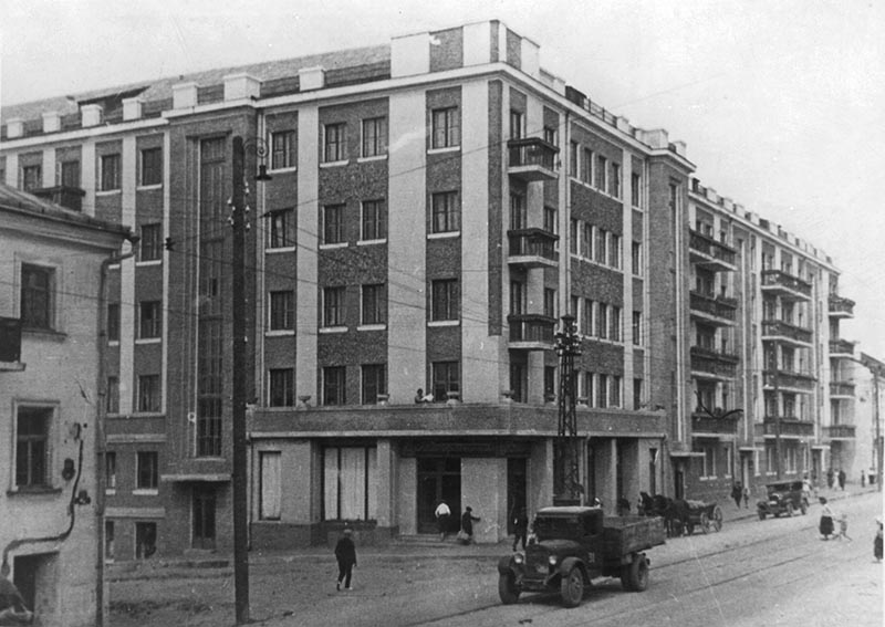 Беларуская (тарашкевіца): Менск (Miensk), Траецкае прадмесьце (Trajeckaje pradmieściе), рог вуліц Вялікай Барысаўскай (vulica Vialikaja Barysaŭskaja) і Траецкай (vulica Trajeckaja). Трэці дом Саветаў